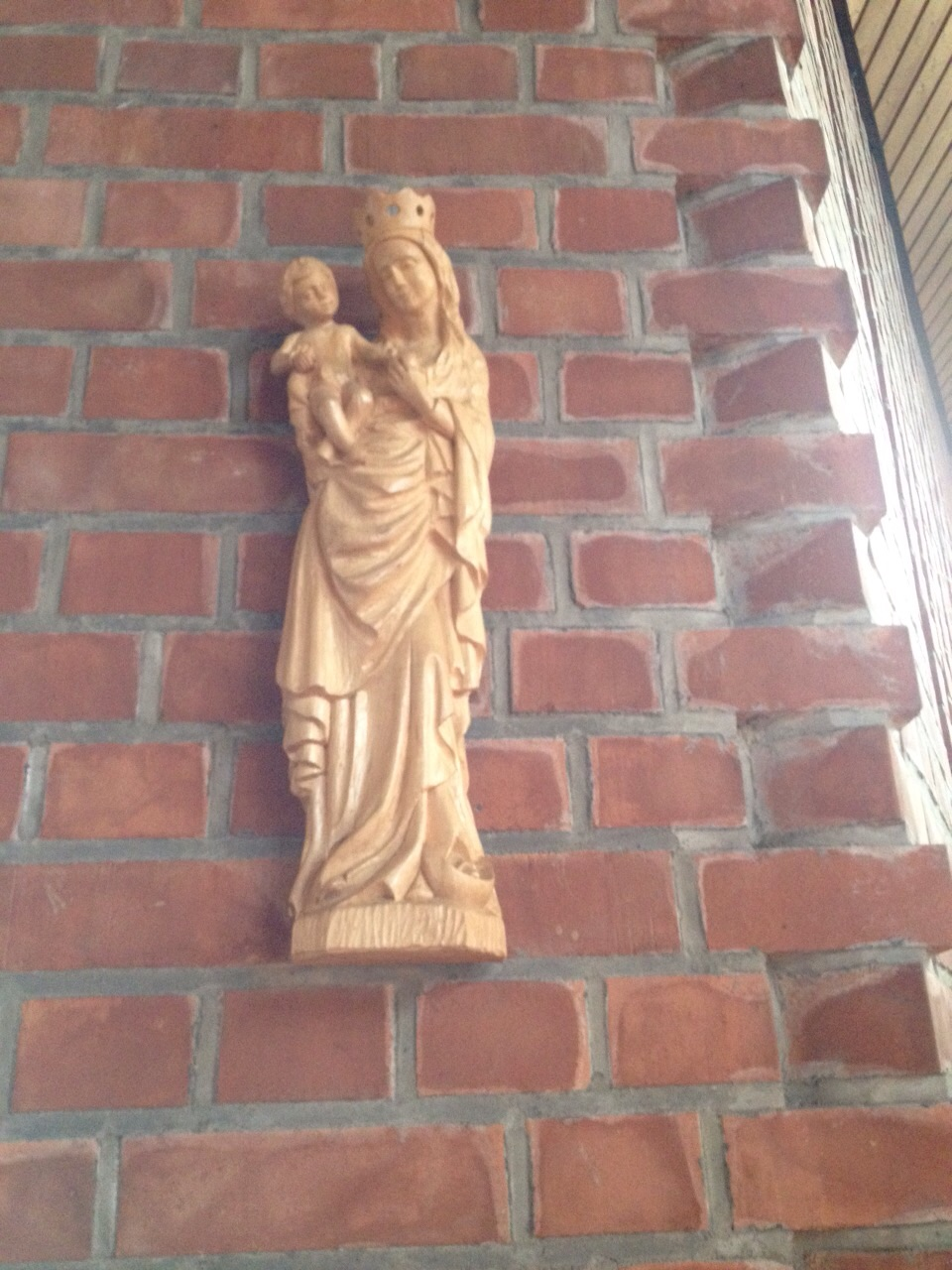 Eine Holz-Statue, die von jemanden aus der Gemeinde geschnitzt wurde.